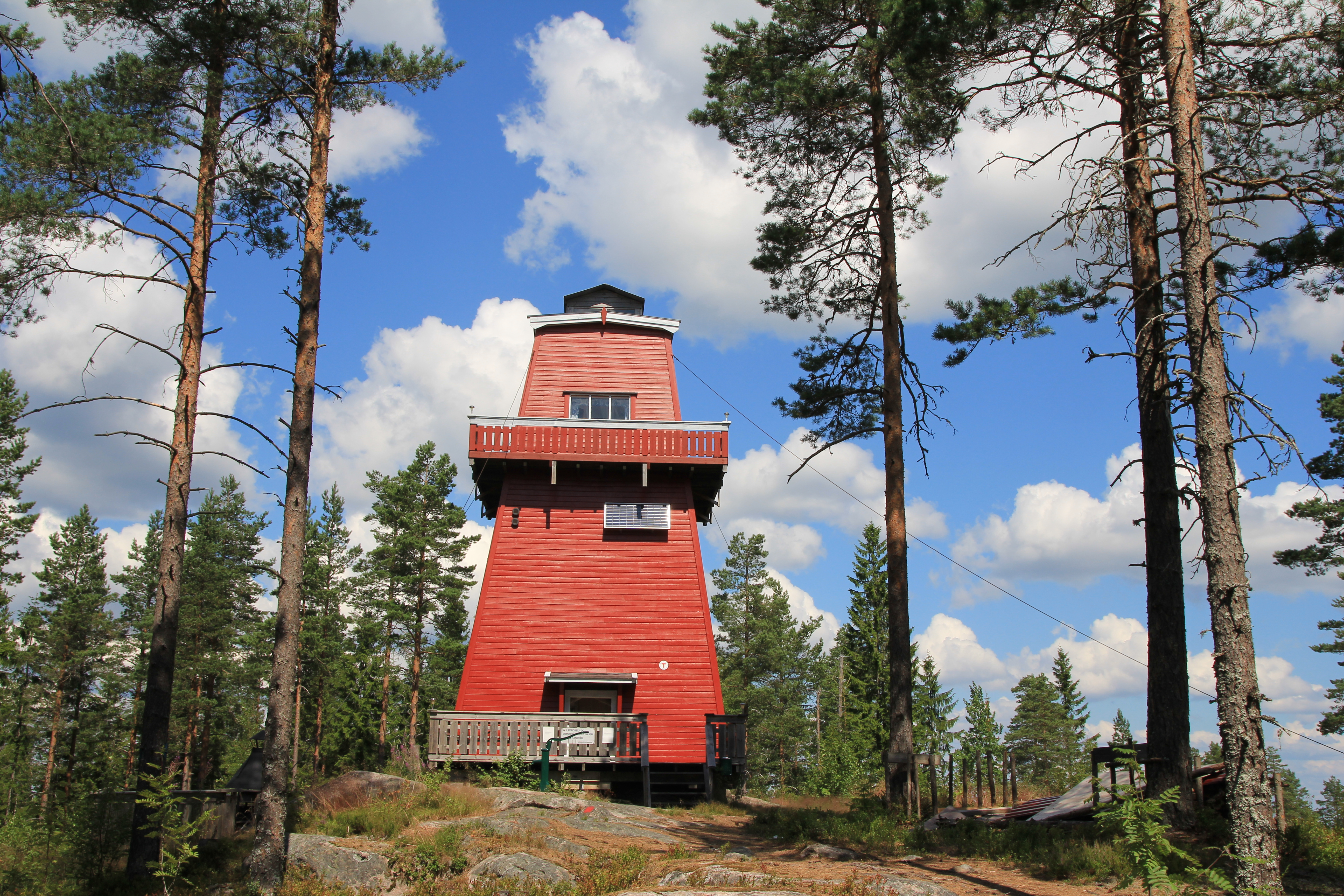 Tårnet på Haukenesfjellet